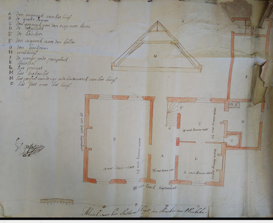 Bouwplan pastorie Wambeek met beschrijving der plaatsen